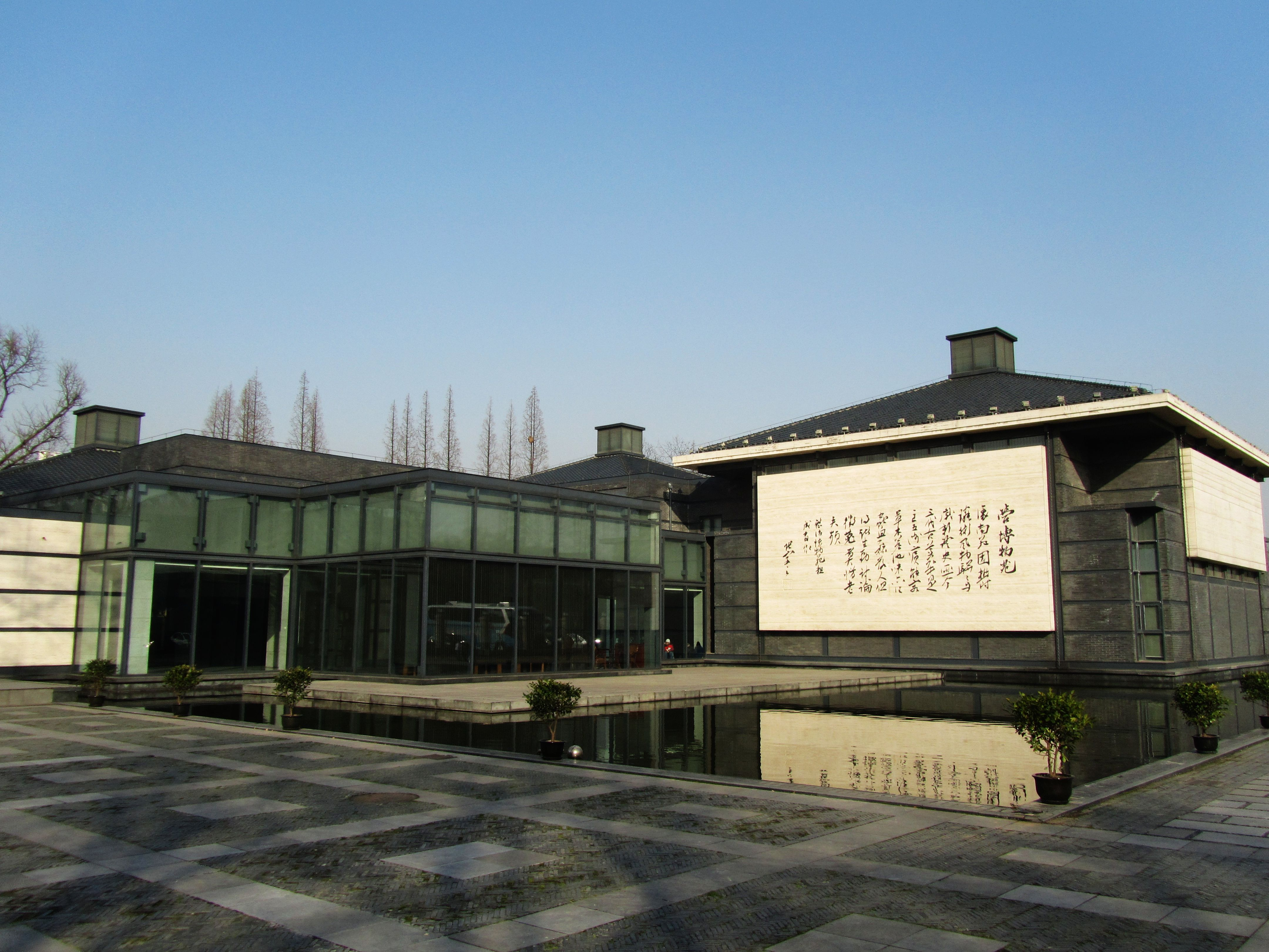 南通博物苑新馆。